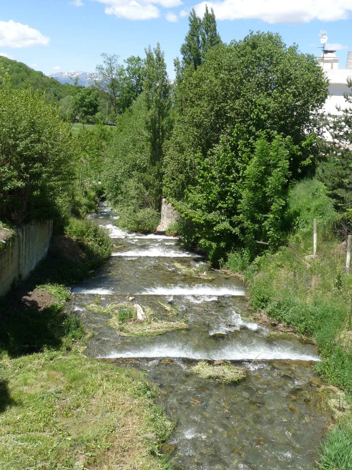 Rivière d'Err à Err, Pyrénées-Orientales, France